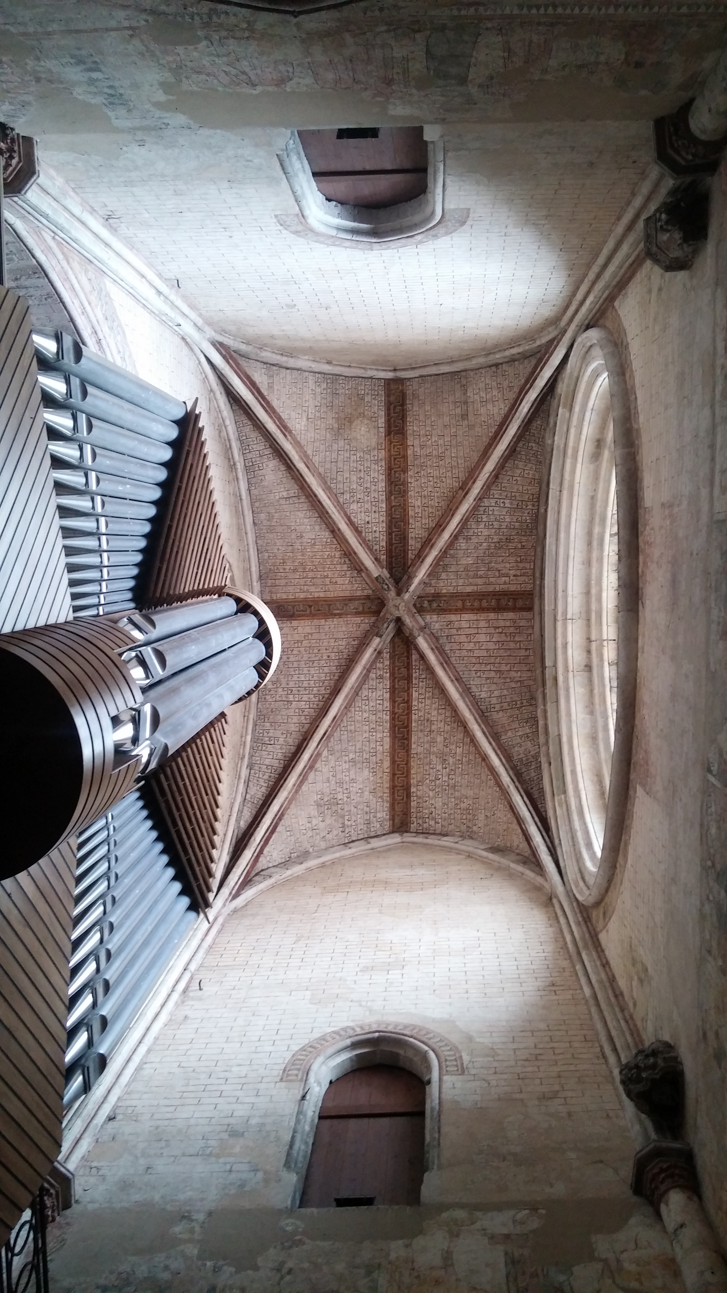 Cathedrale Saint Étienne de Cahors : voûte du narthex et orgue